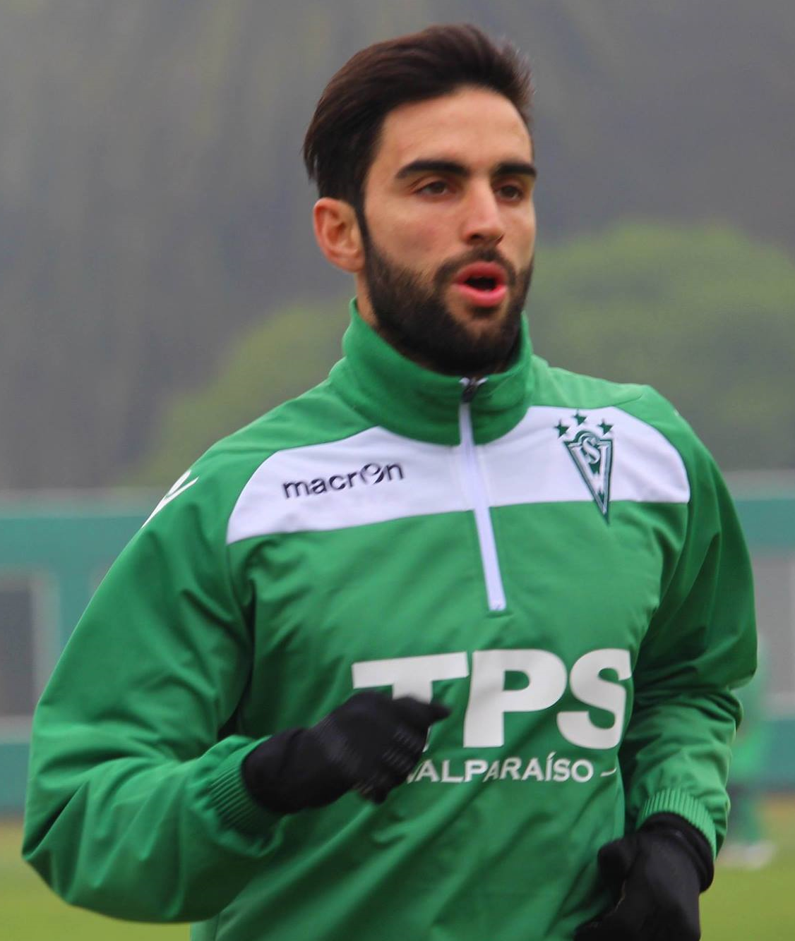 Fotografía de Rodrigo Pastorini, futbolista profesional.